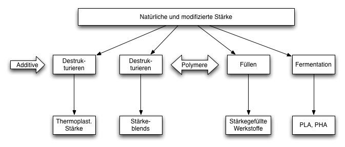 Herstellung von Biopolymeren auf Stärkebasis (Stärkepolymer)